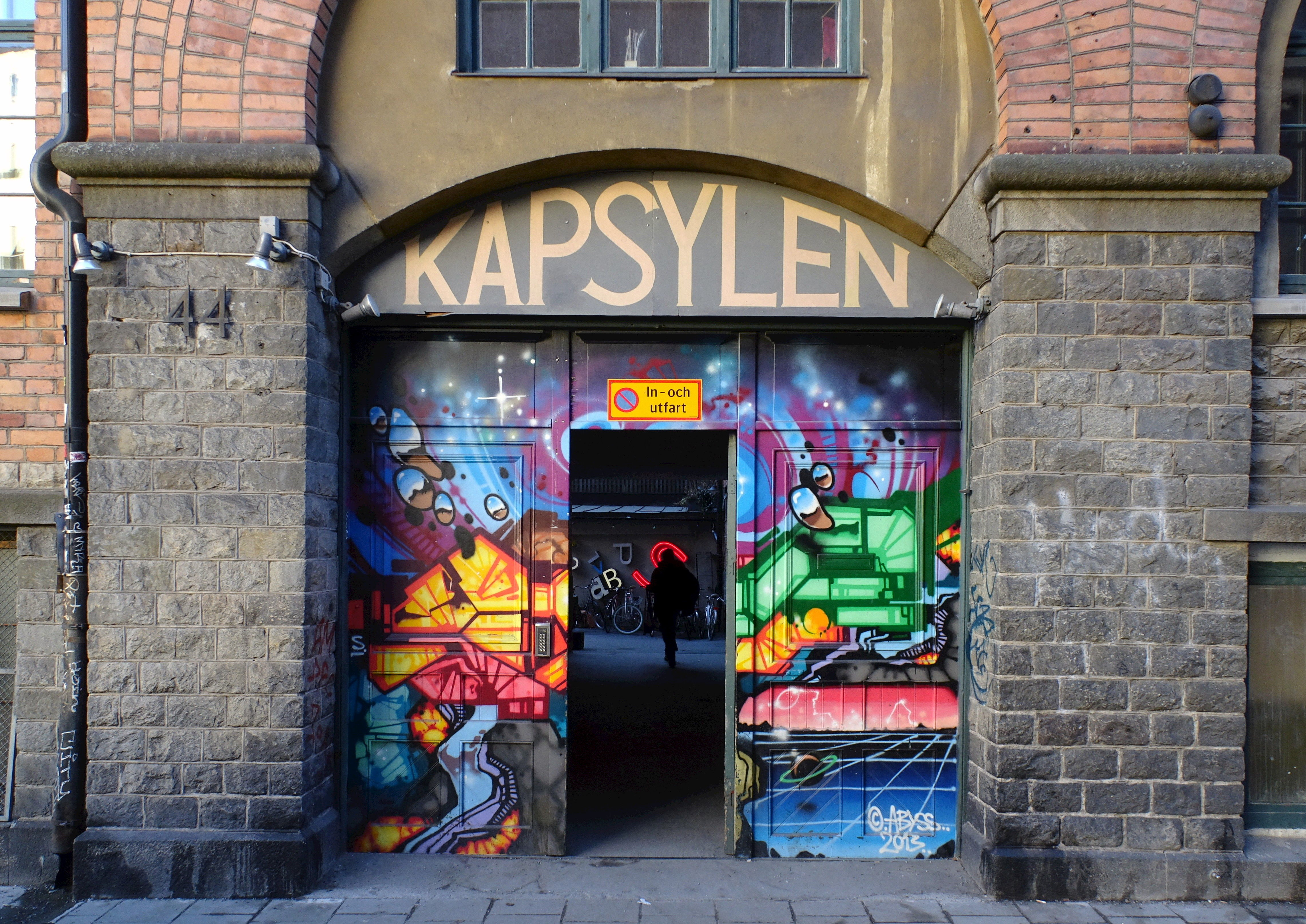 Sveriges kapsylfabrik, entré